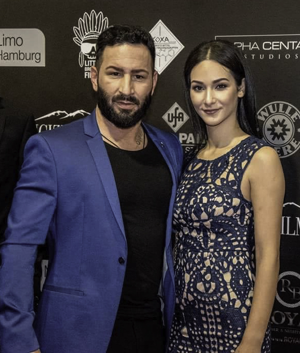 Tito Uysal mit Hala